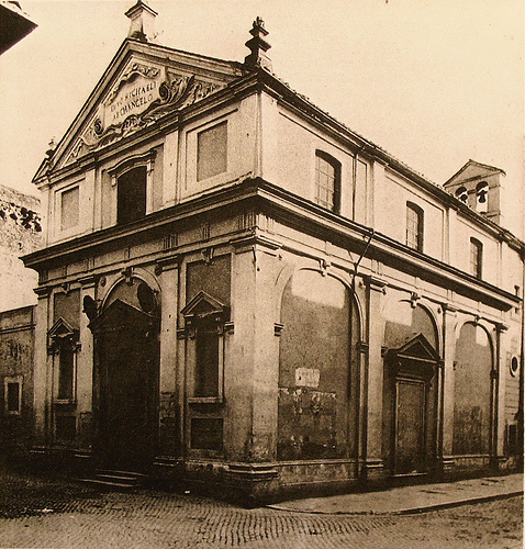 La Chiesa di Sant'Angelo al Corridoio, prima della demolizione.